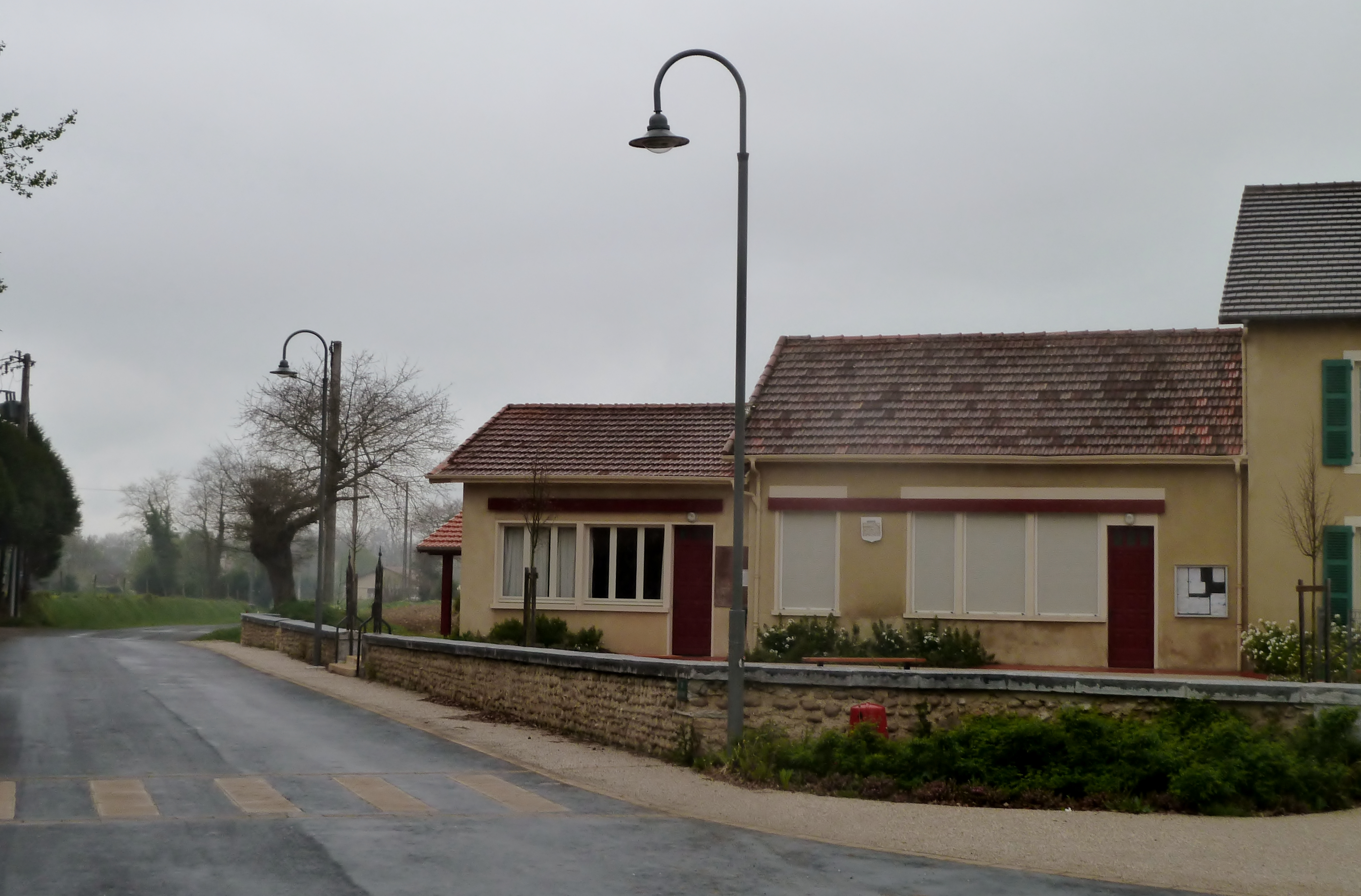 Mairie d'Espéchède